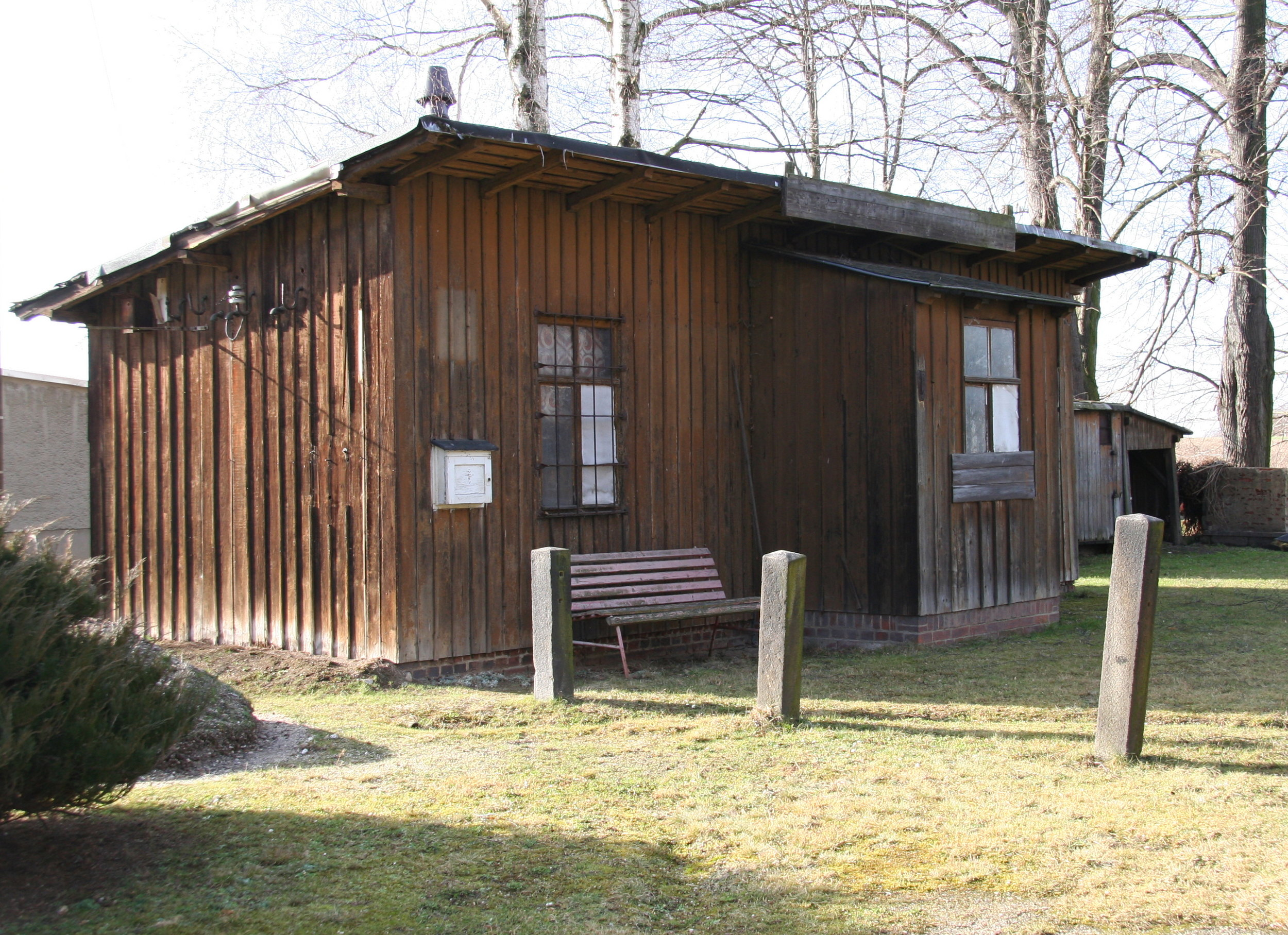 ehemaliges Bahnhofsgebäude in Niedersteinbach (Penig), Sachsen